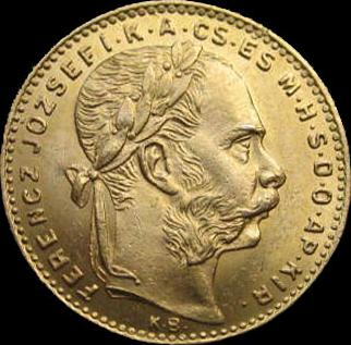 8 forint - 20 frank 1891 - obverse